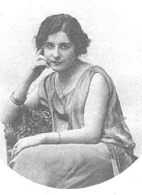 Fotografía de la actriz española Carmen Viance publicada en 1926 con motivo de su participación en la película La casa de la Troya